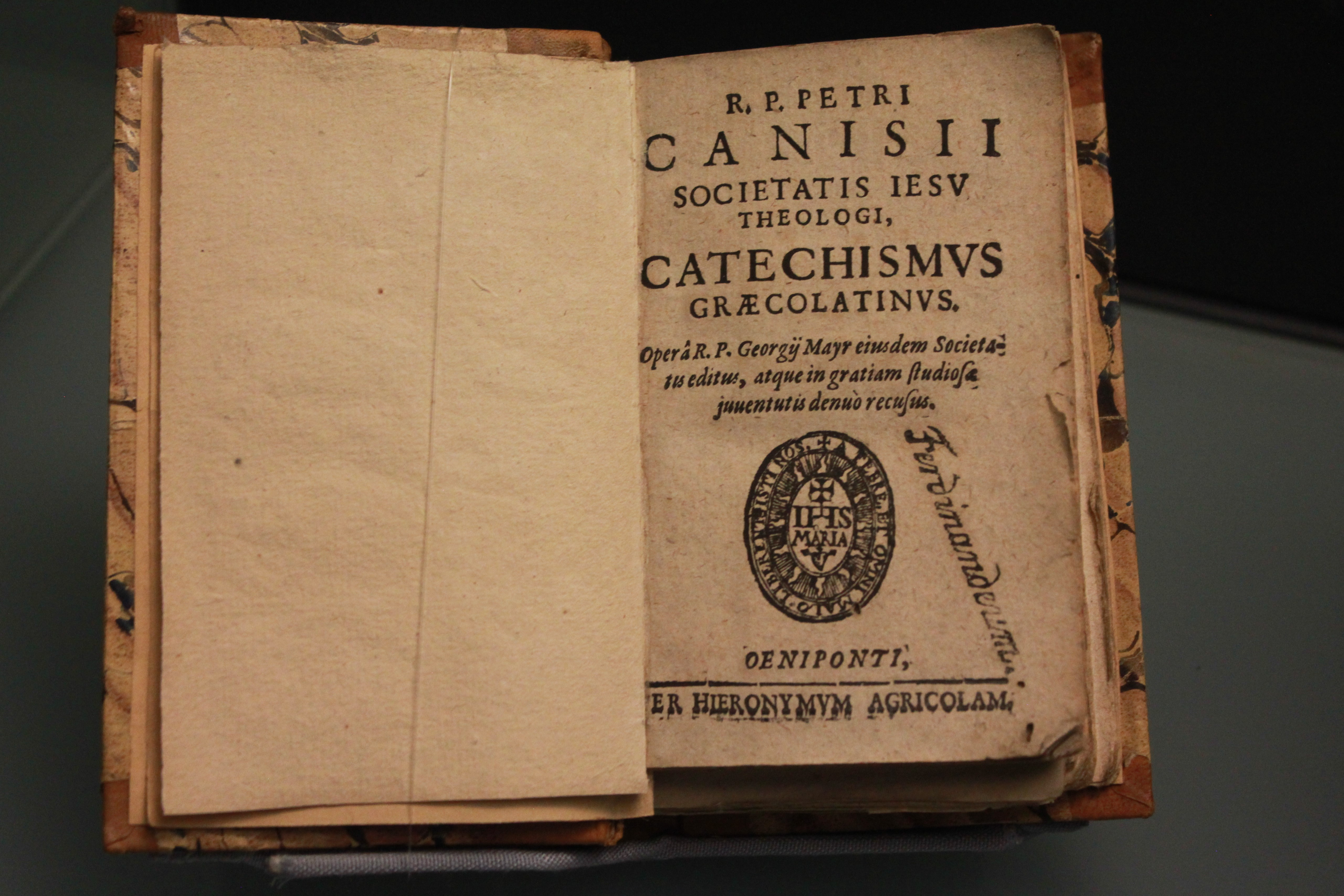 Catechismus Graecolatinus von Petrus Canisius, gedruckt bei Agricola in Innsbruck, ausgestellt im Museum im Zeughaus.